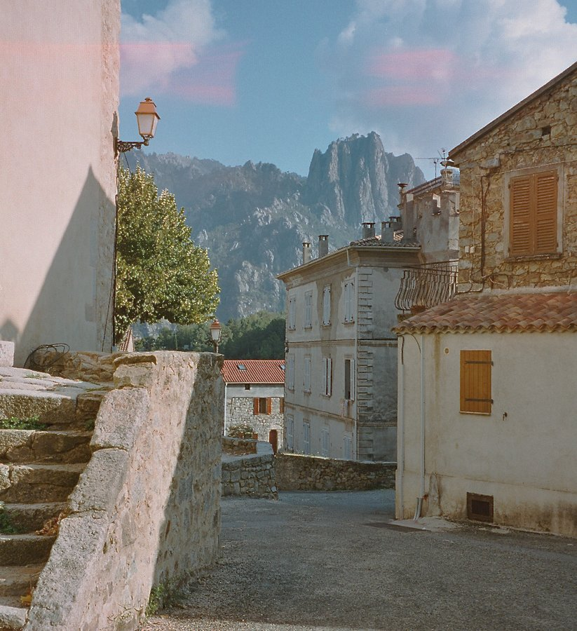 Ghisoni (Haute-Corse), une rue dans le village, avec vue sur les montagnes environnantes